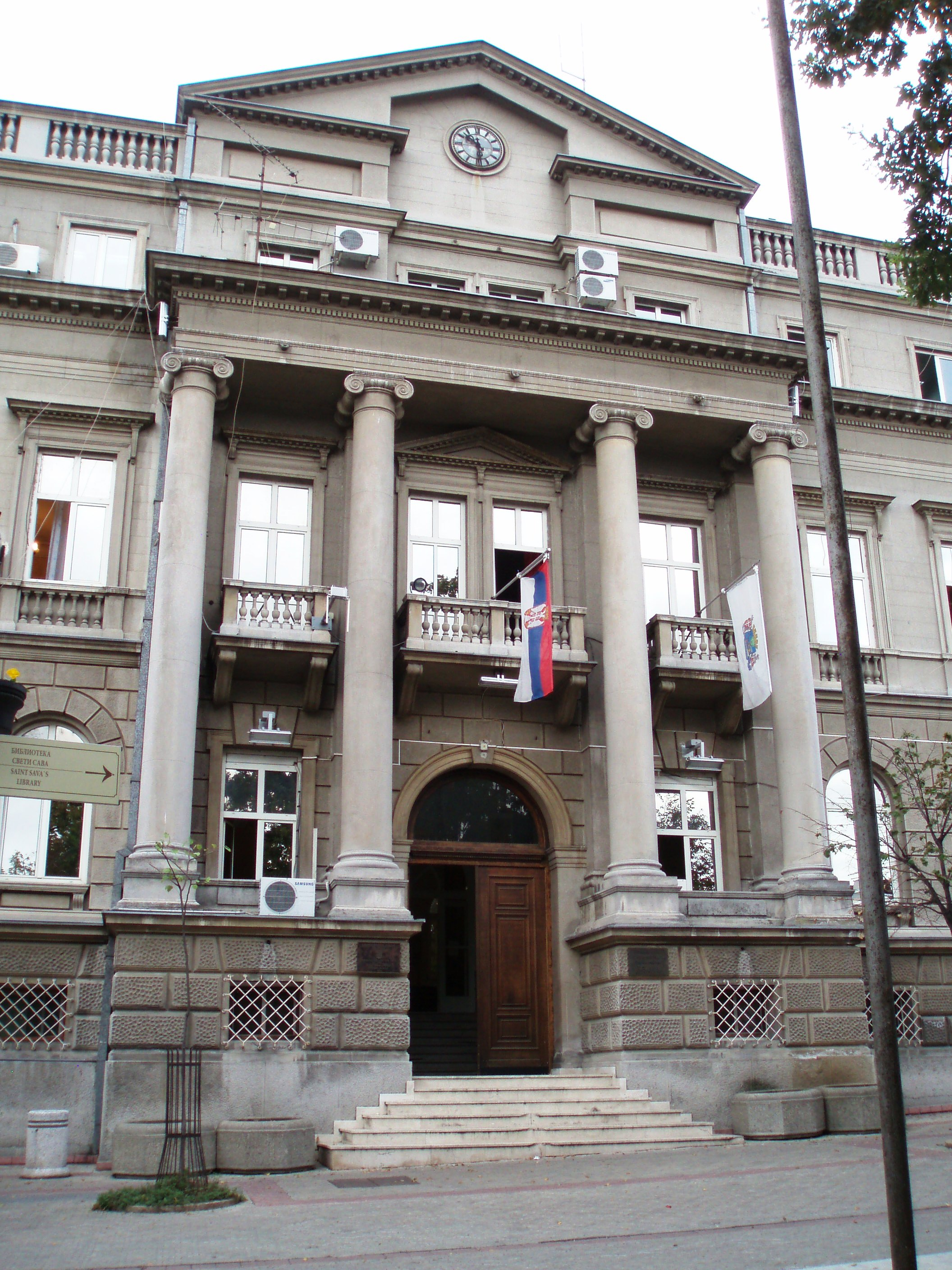 Magistratski trg, ulaz u Opštinu, autor fotografije: Nicolo